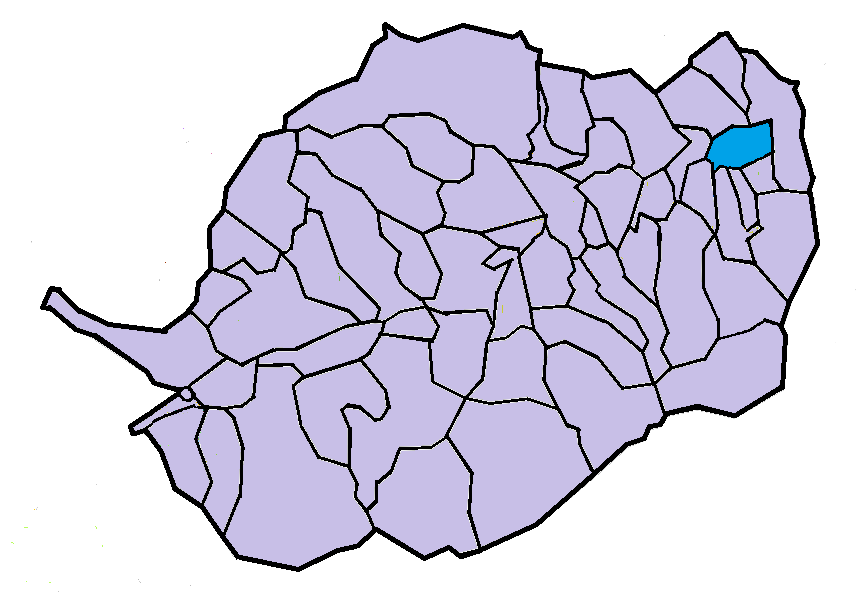 Vinçà en el Conflent, a partir del mapa municipal del Conflent de lliure disposició adaptat al Nomenclàtor toponímic aprovat el 2007